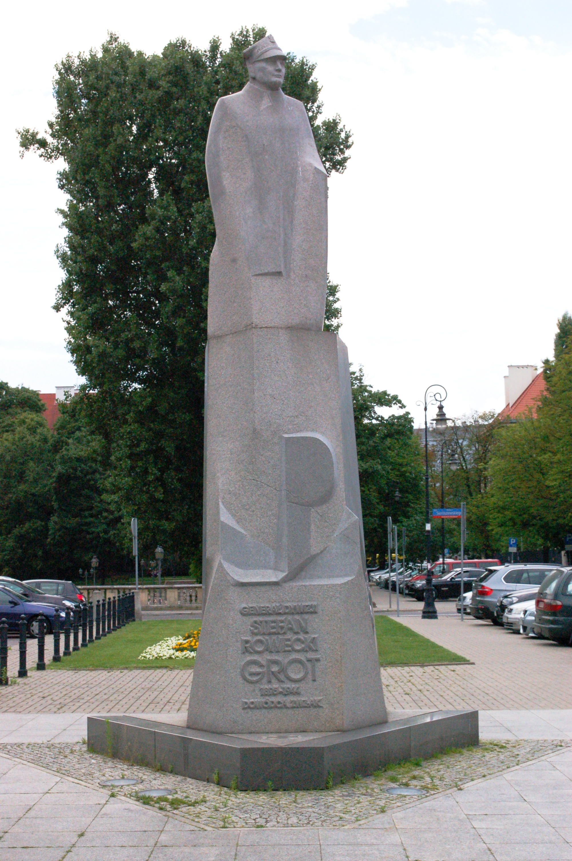 Warschau